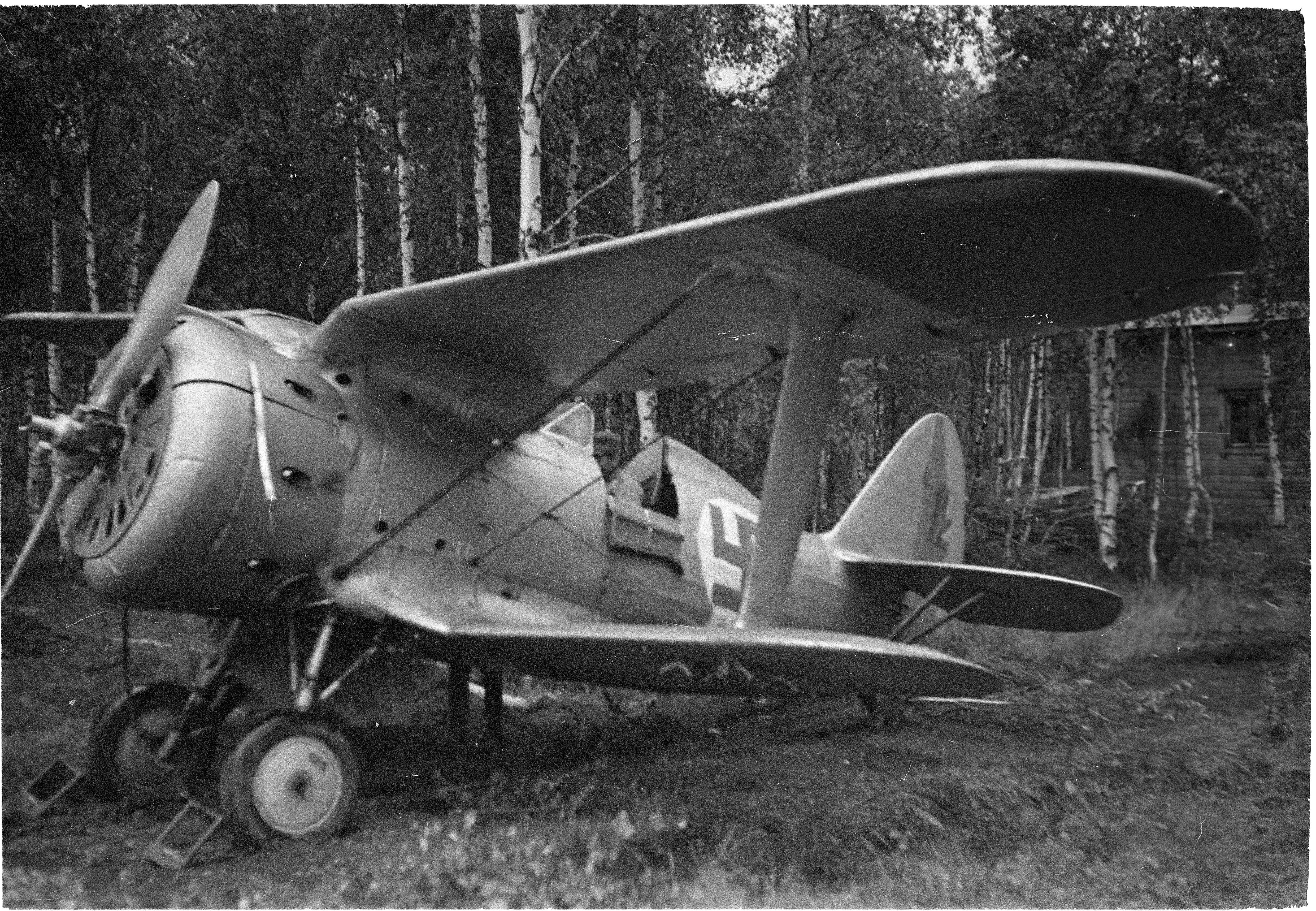 Venäläisen Curtiss-hävittäjäkoneen päälle maalattu meidän ilmavoimiemme hakaristimerkki. (Alkuperäisen kuvatekstin tiedosta poiketen kuvassa on Polikarpov I-153) Kuvauspaikka: Mikkeli